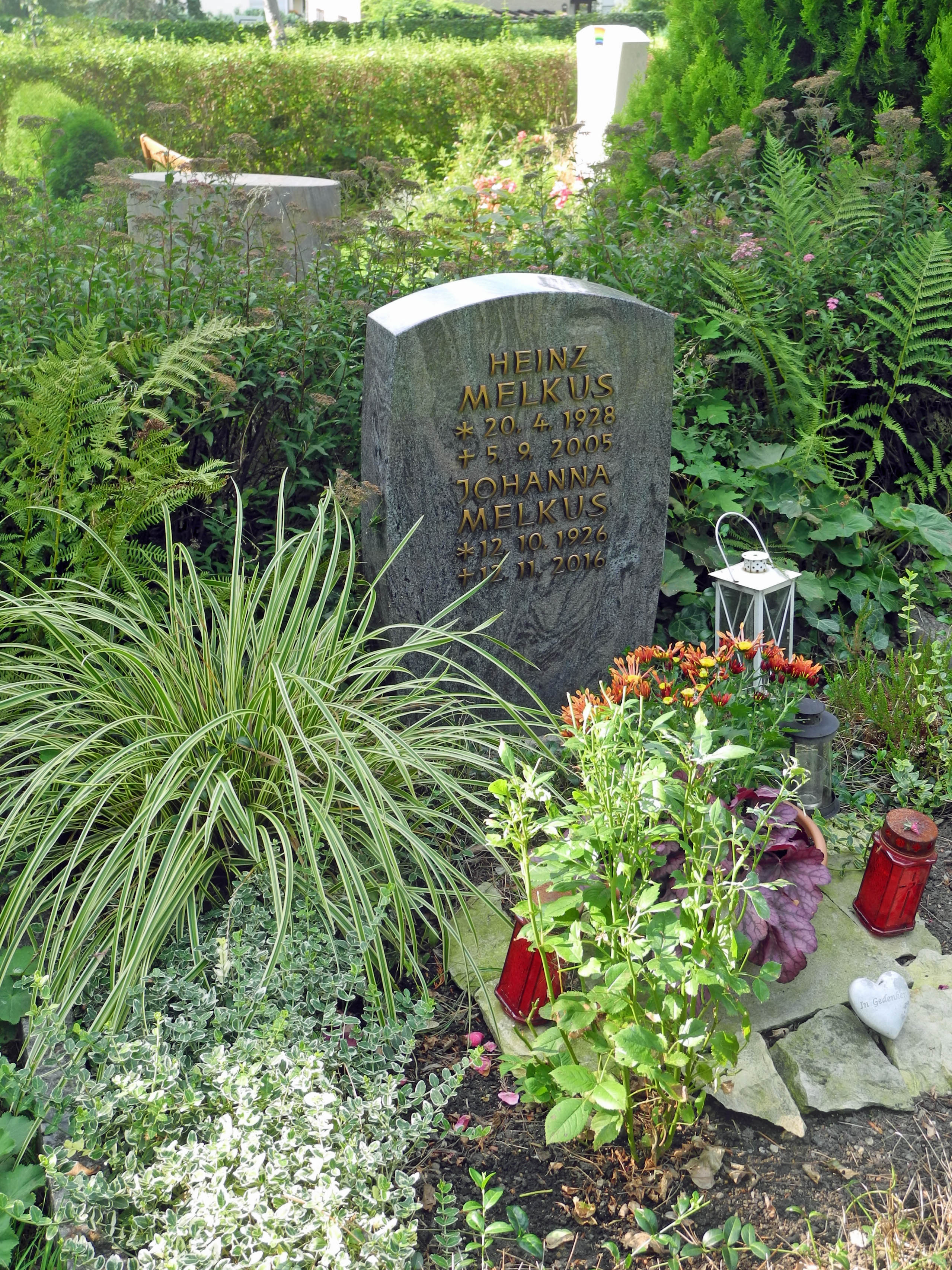 Grab von Heinz Melkus (* 20. April 1928; † 5. Sept. 2005) auf dem Bühlauer Friedhof in Dresden